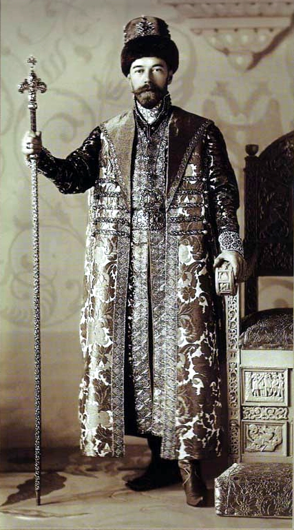 Николай 2